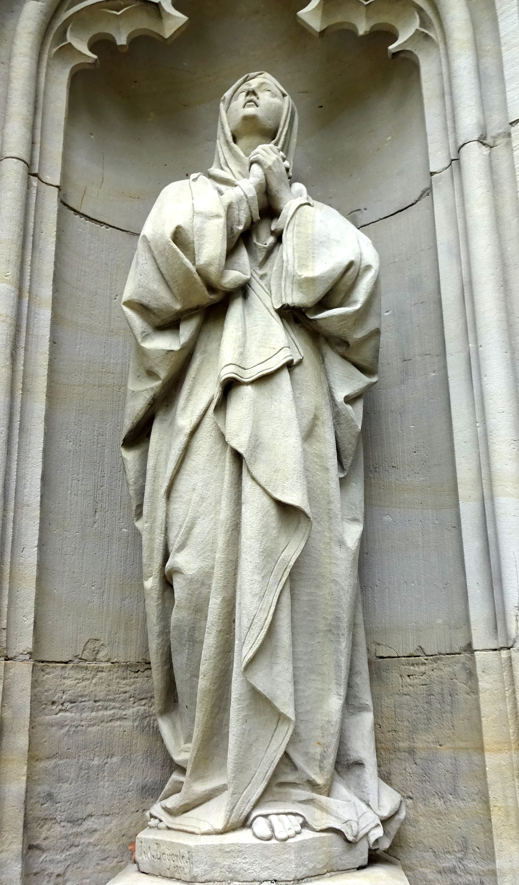 Madonna vom Bildhauer Julius Bayerle am Hochkreuz, Nordfriedhof Düsseldorf